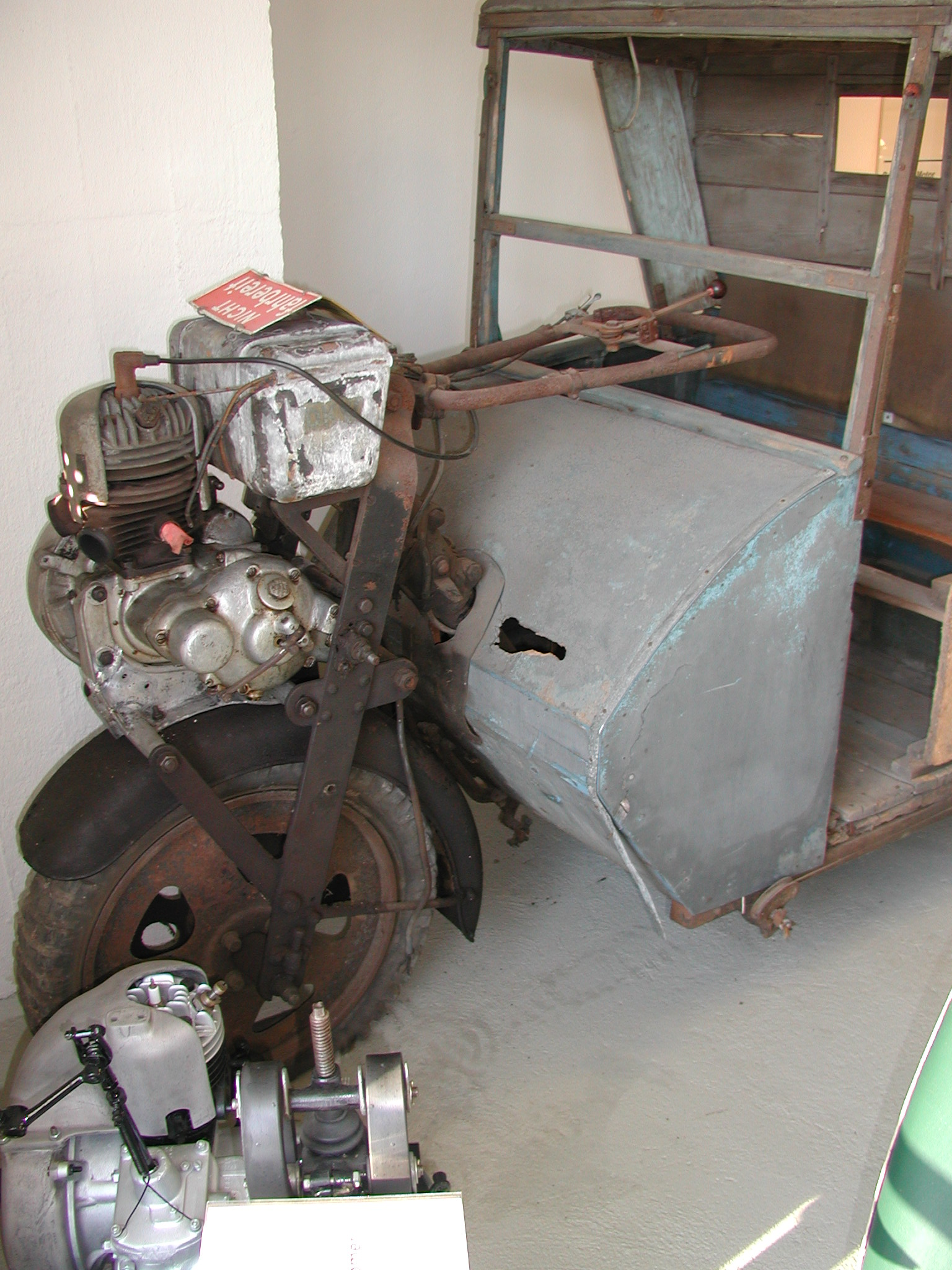 Antriebsteil des ältesten Exponates im Museum, wahrscheinlich ein LT200